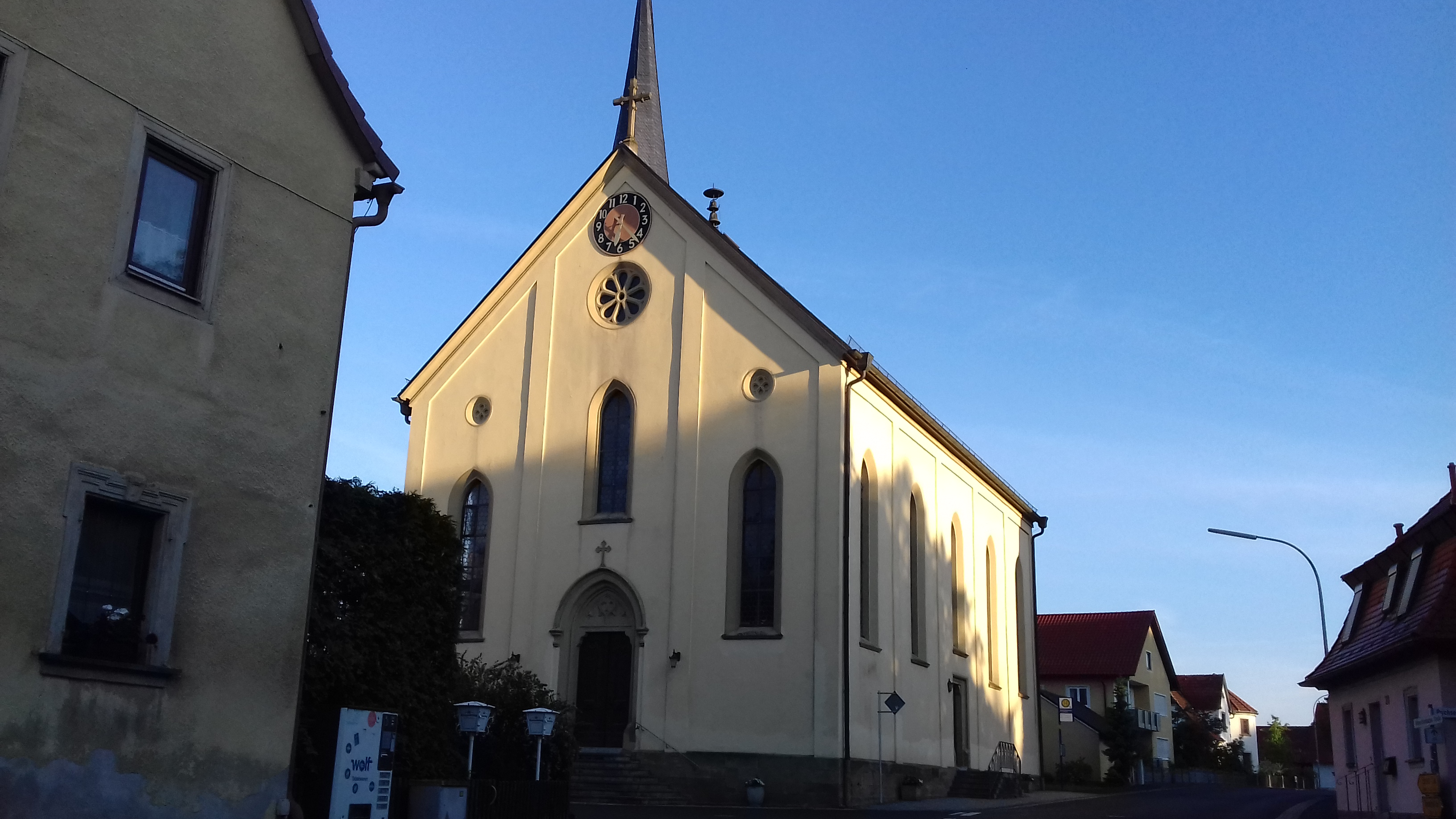 Die Kirche von Kirchschönbach